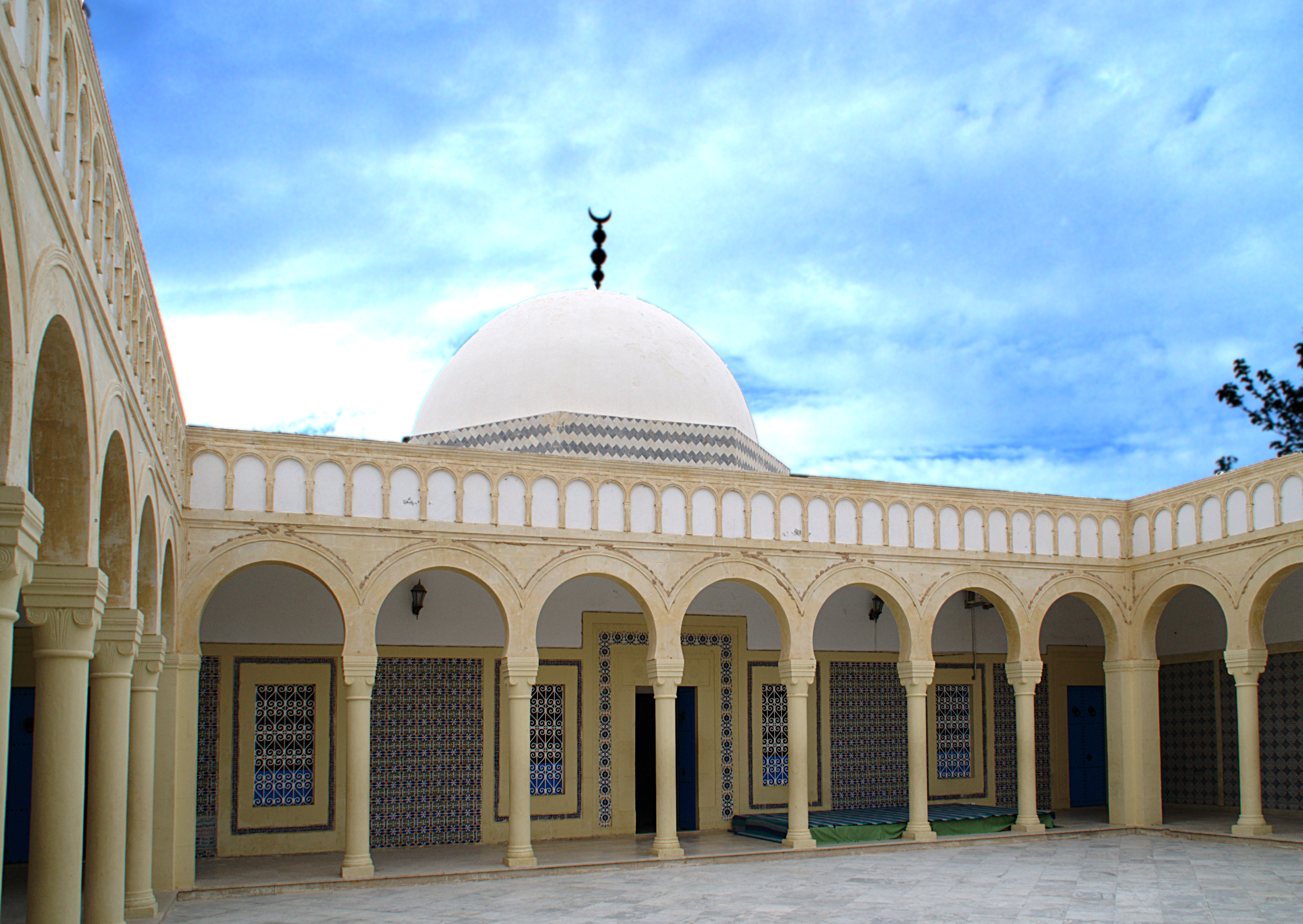 Mausolée de l'Imam Mohamed Ibn Ali el Mezari et la zaouïa adjacente (dans le cimetière nord de la ville), Monastir